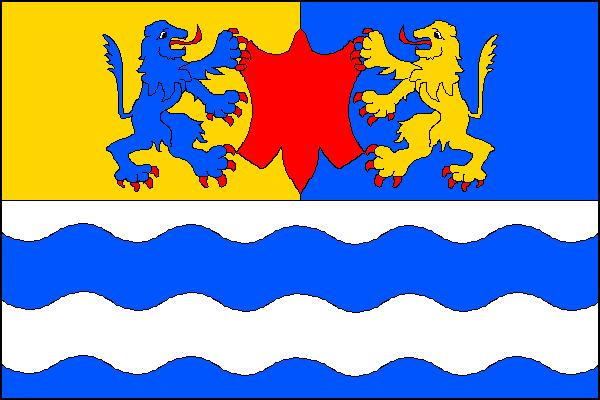 Vlajka obce Brtnice